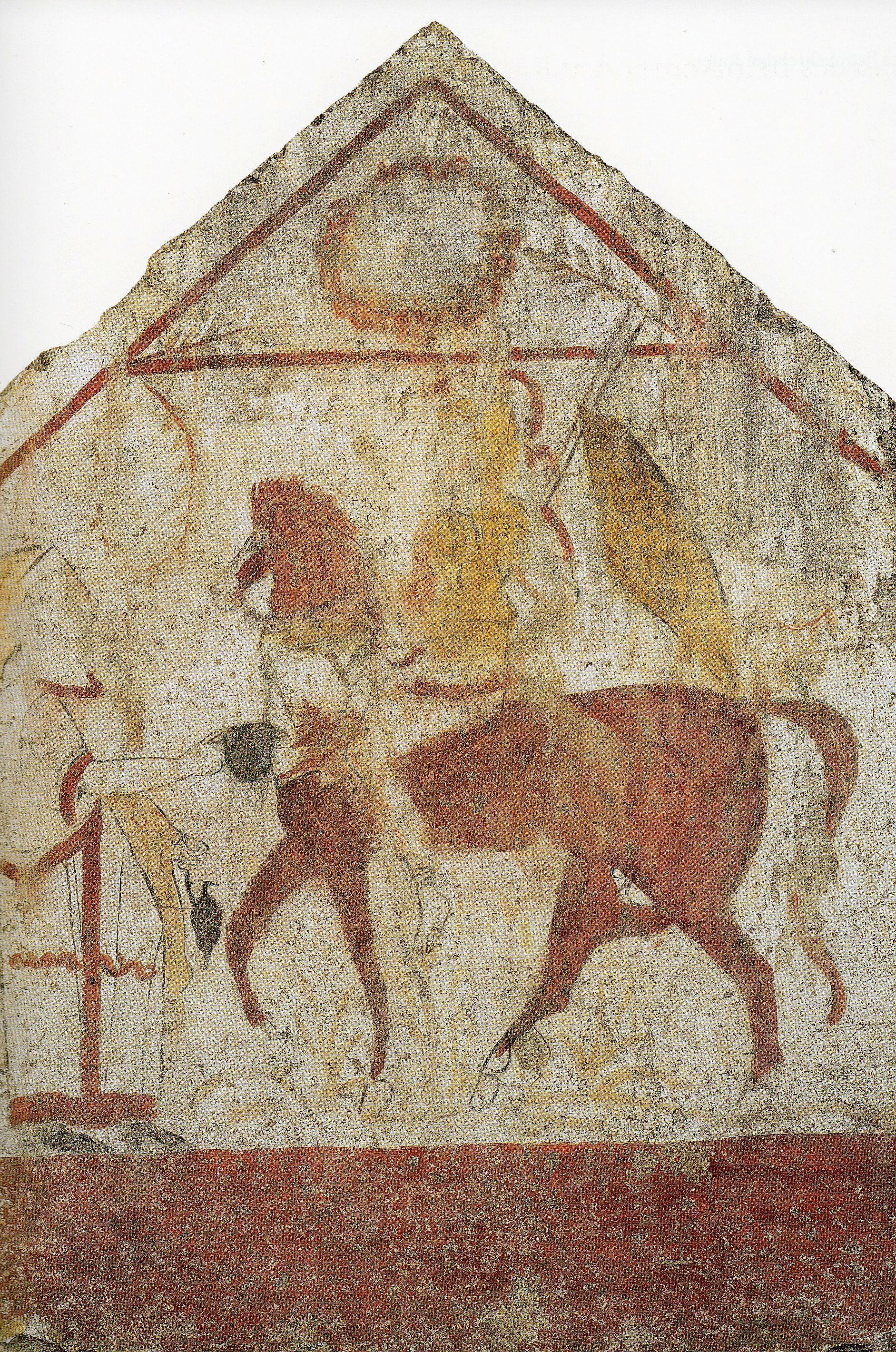 Paestum, Grab des heimkehrenden Ritters. Namengebende Platte.